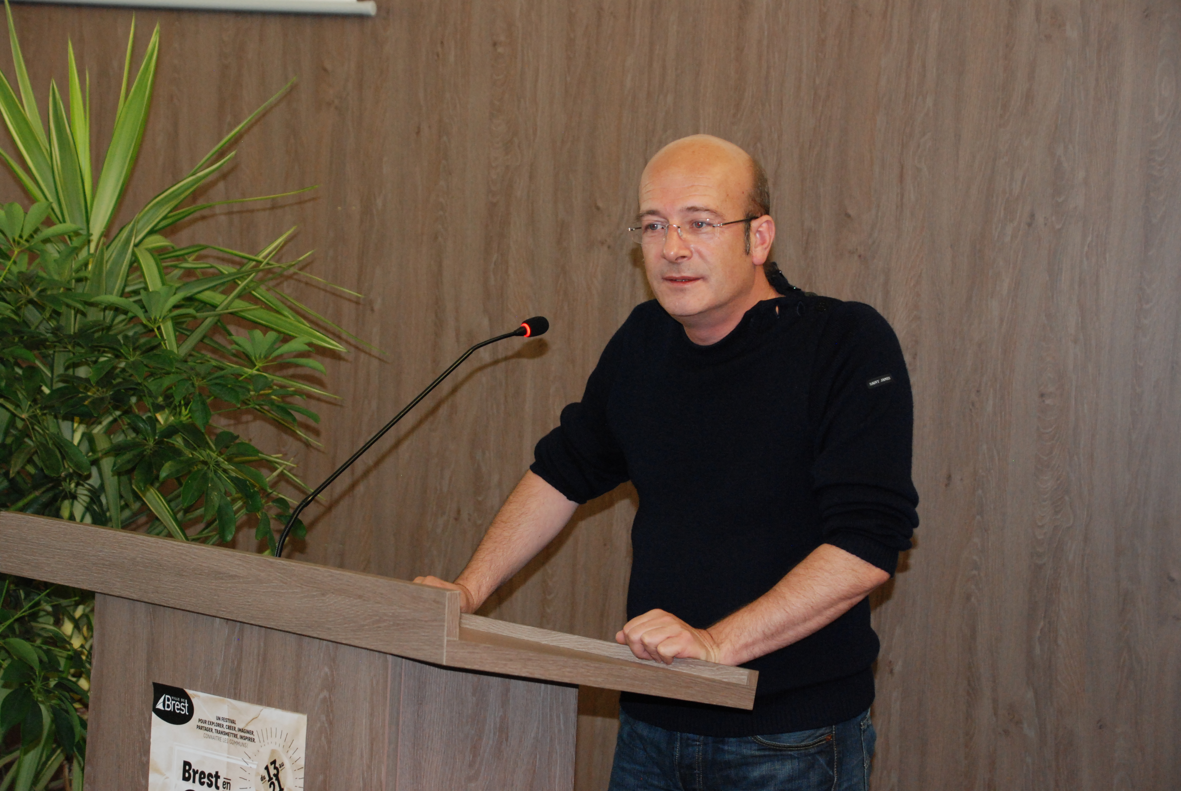 Temps fort du festival Brest en communs avec les acteurs des communs brestois, au pôle numérique de l'UBO.